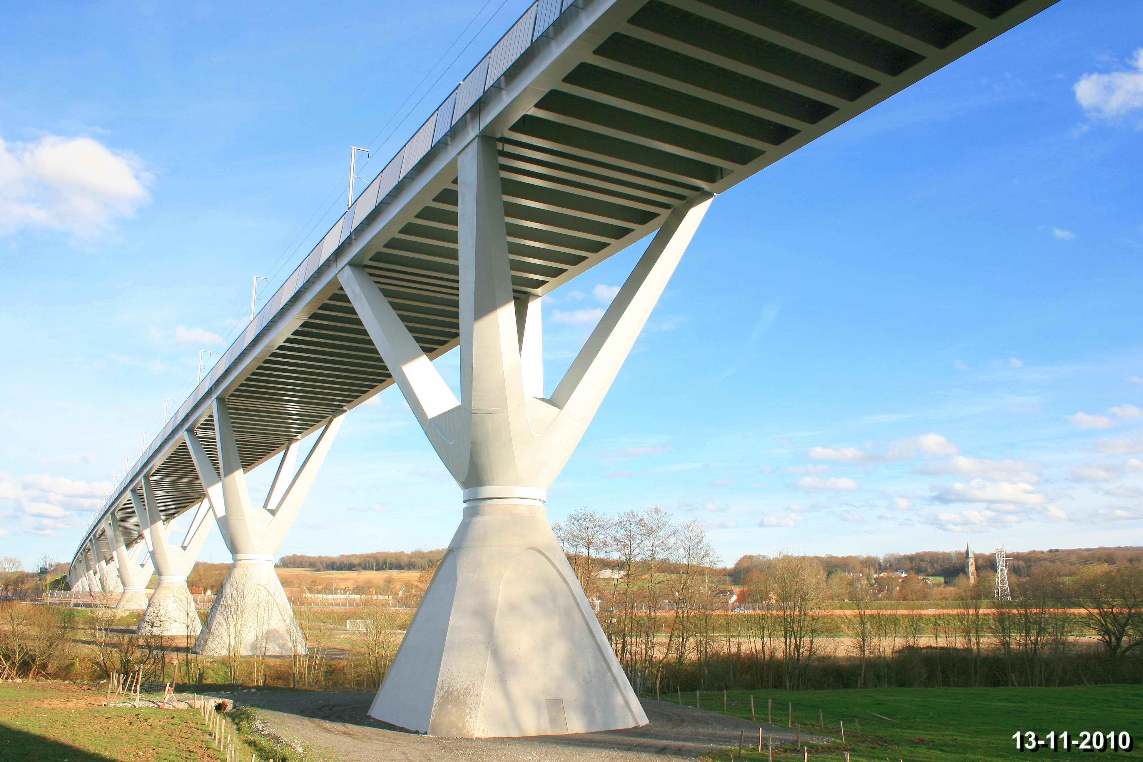 Viaduc de la Savoureuse. Ligne T.G.V. Trévenans. Territoire de Belfort.